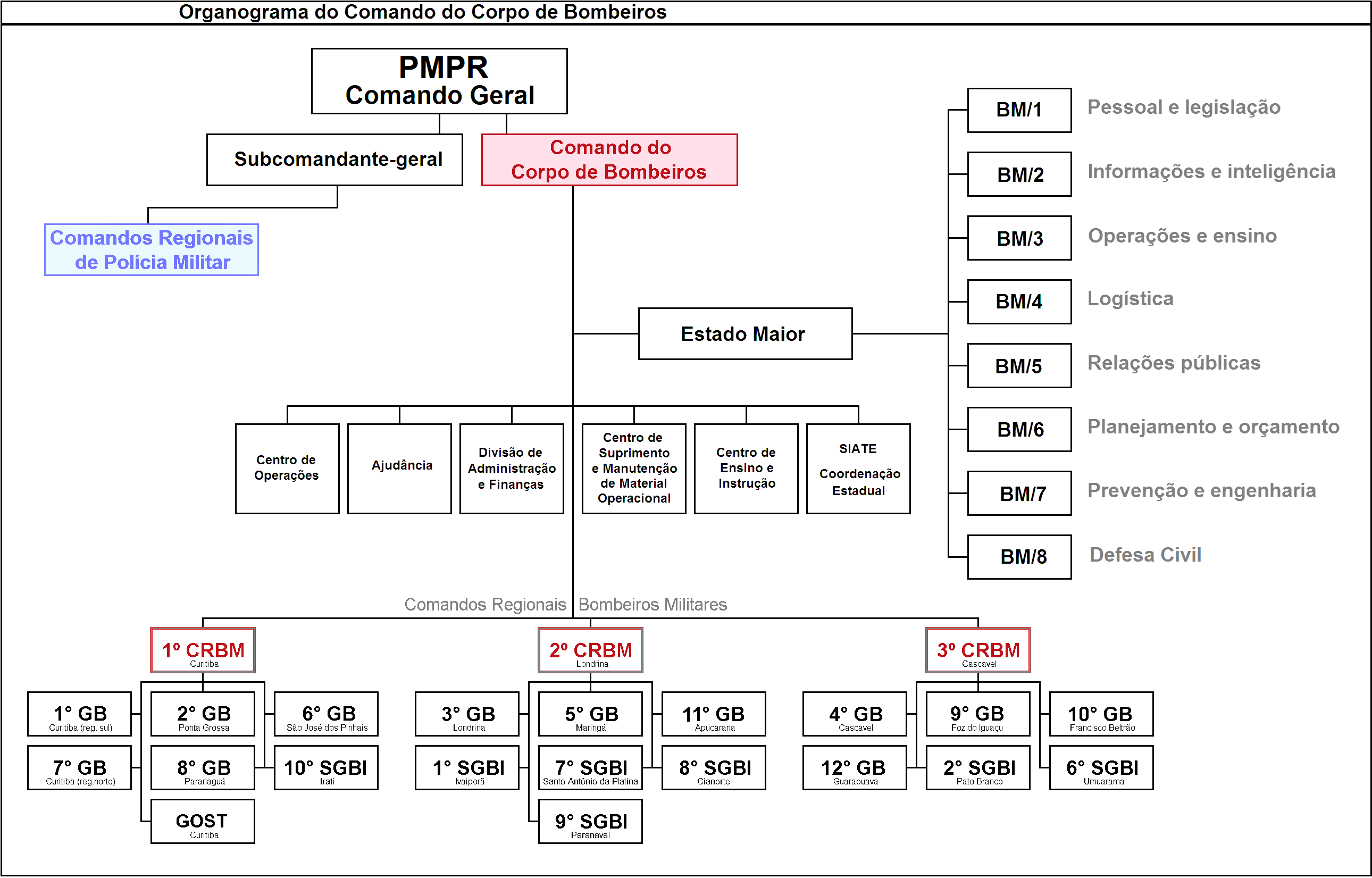 Organograma do Corpo de Bombeiros do Paraná, 2014.